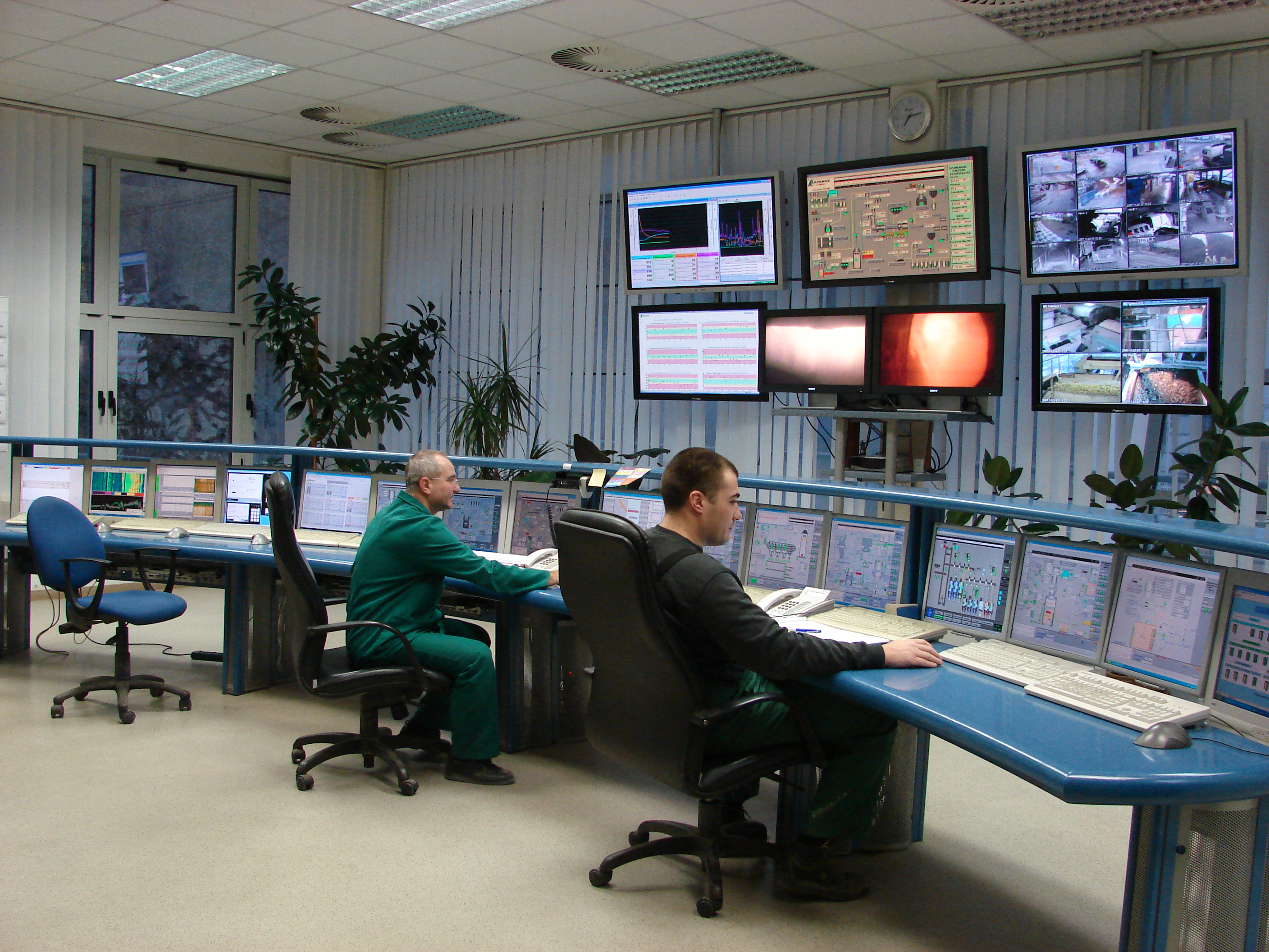 Pogled na kontrolno sobo, tretjo točko na industrijski poti po trboveljski cementarni.